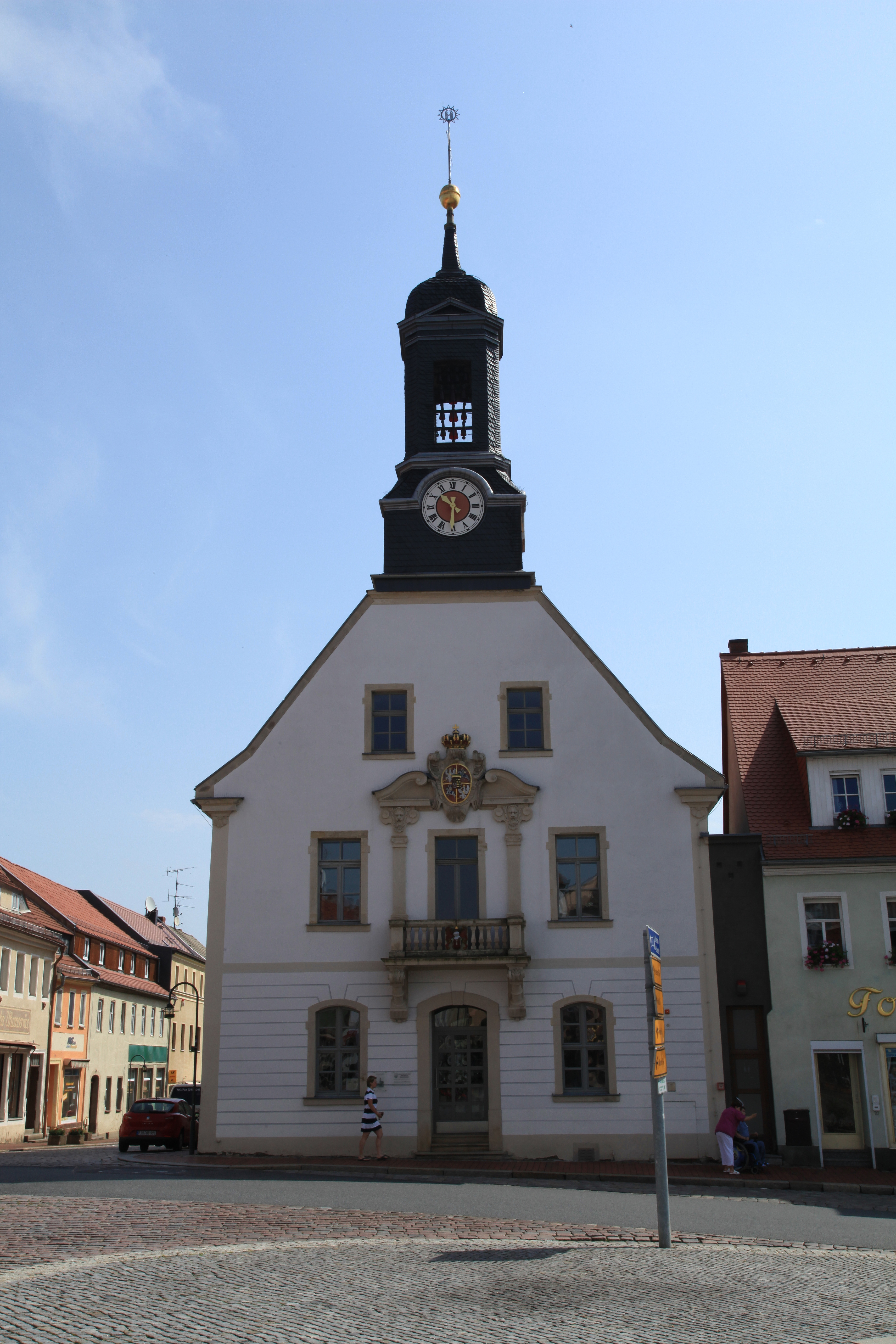 Altes Rathaus, Markt 1 in Wilsdruff